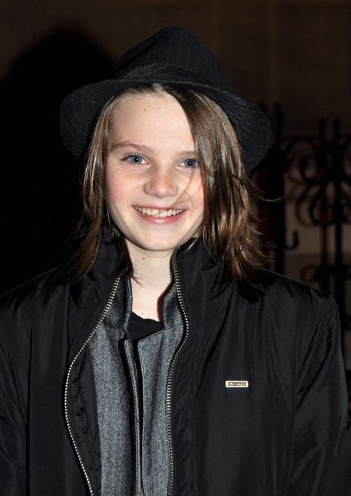 Zoé Héran à la cérémonie des Prix Lumières